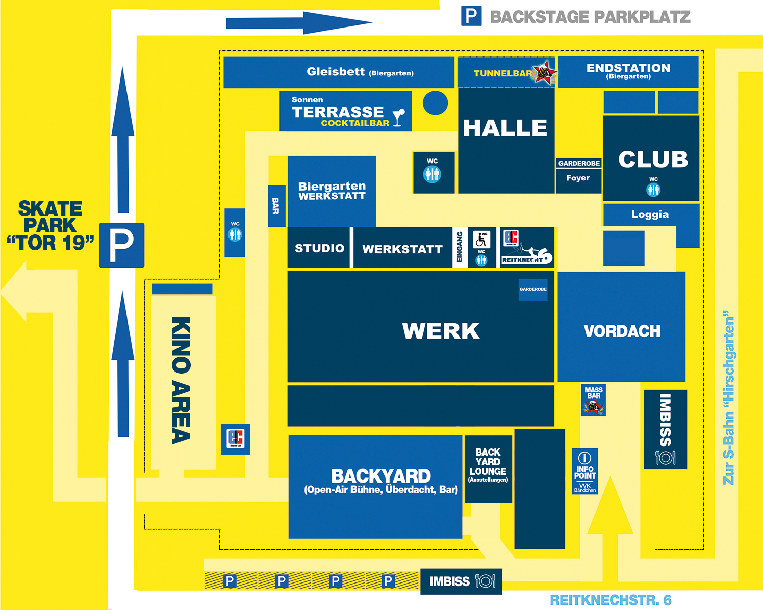 Gelände Plan Free & Easy Festival